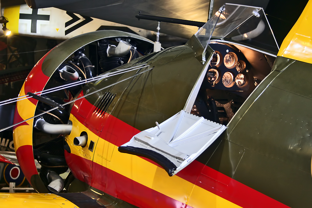 San Diego Air & Space Museum - Balboa Park